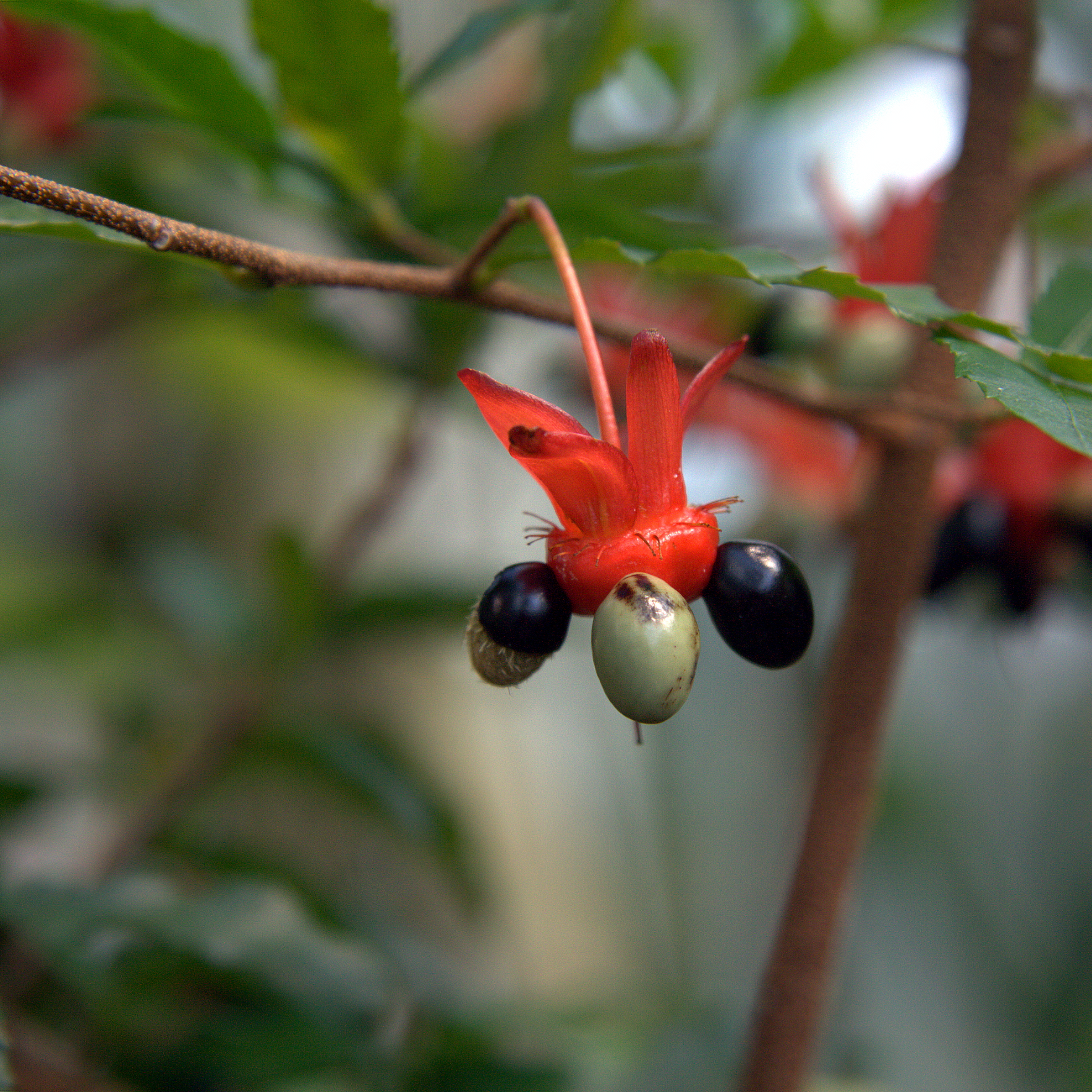 Ochna serrulata